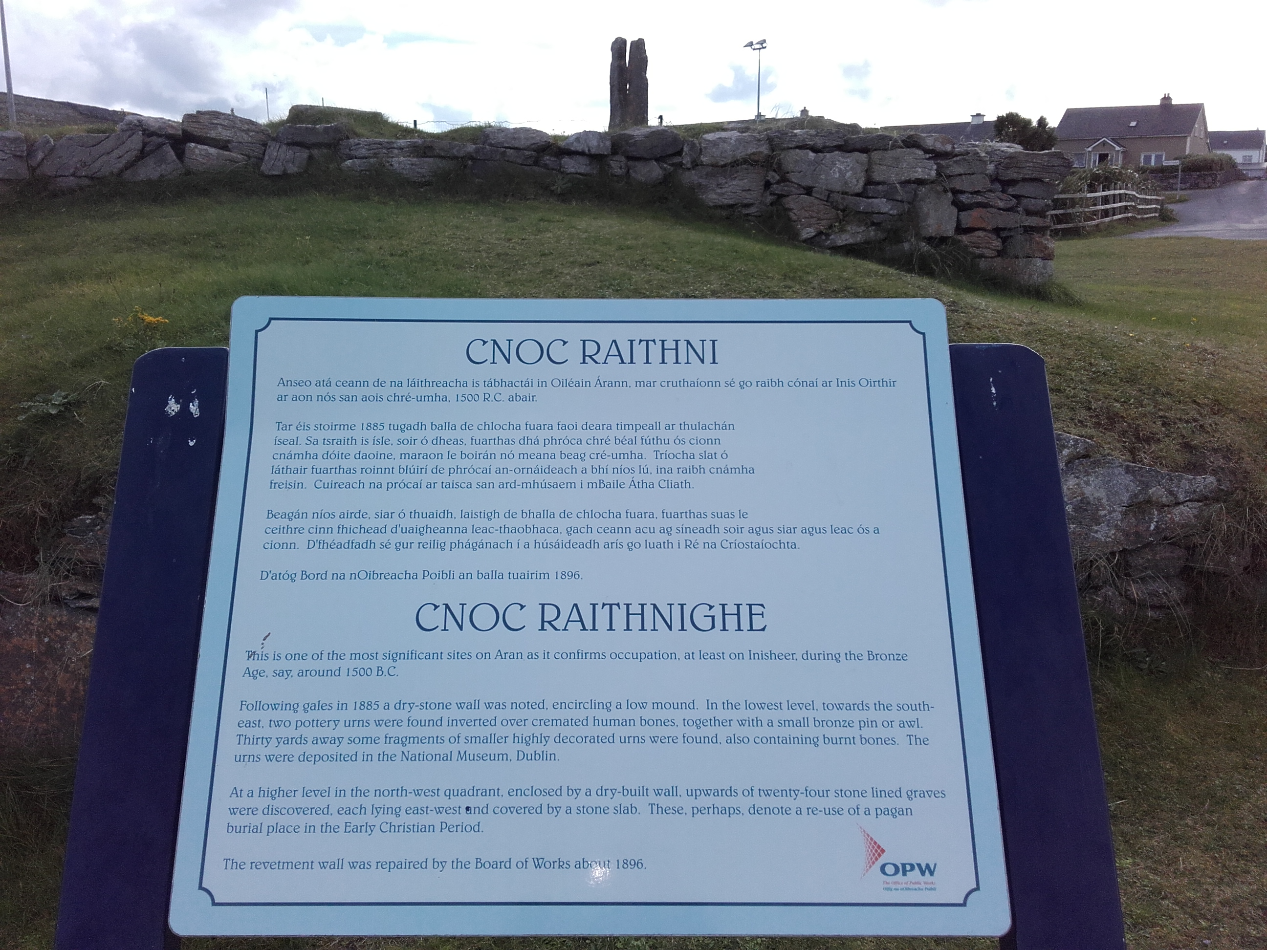 Sinal informativo sobre Cnoc Raithni, Inis Oírr.